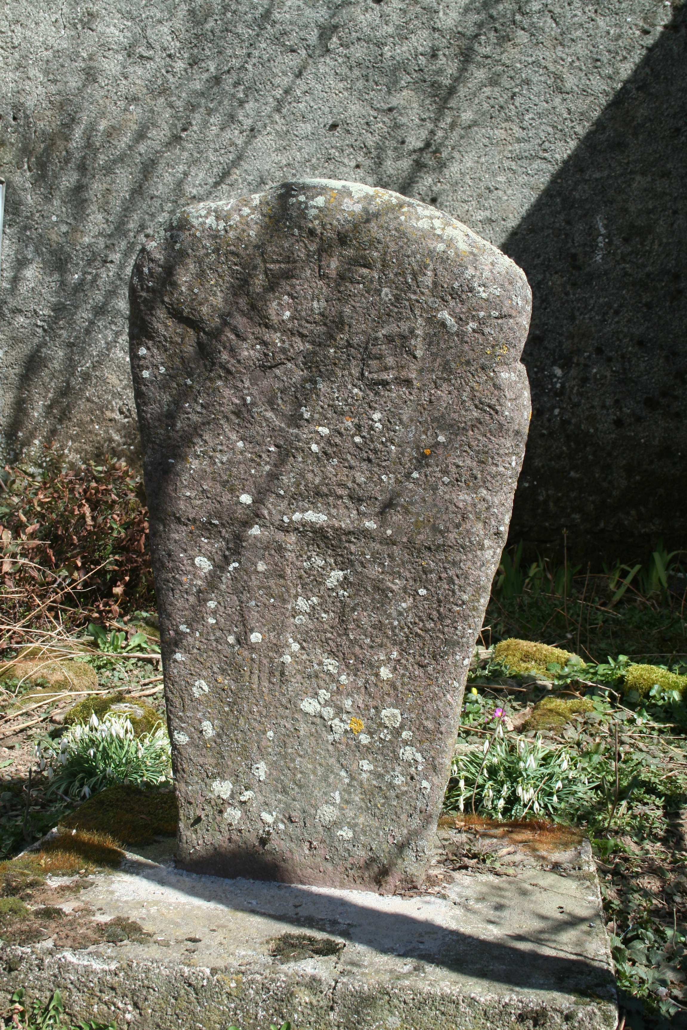 Lacaune (Tarn) - Statue-Menhir de Haute Vergne.